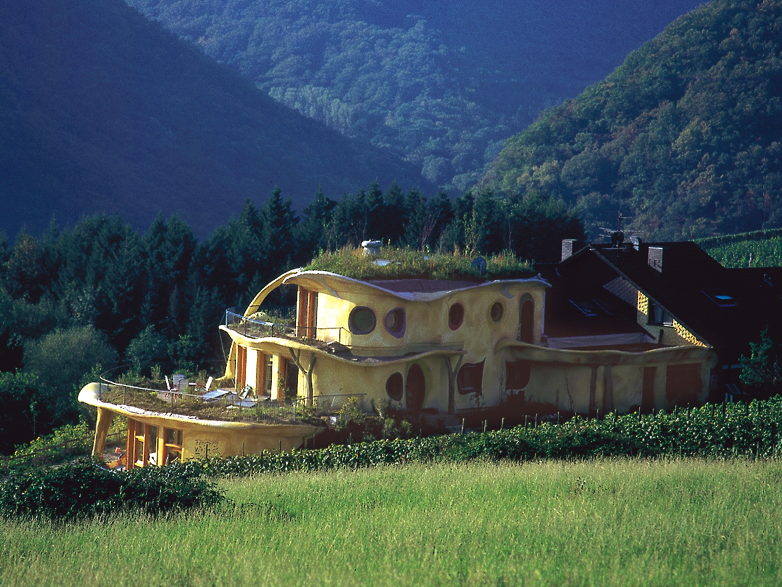 Förstes Weinterrassen, Bad Neuenahr-Ahrweiler